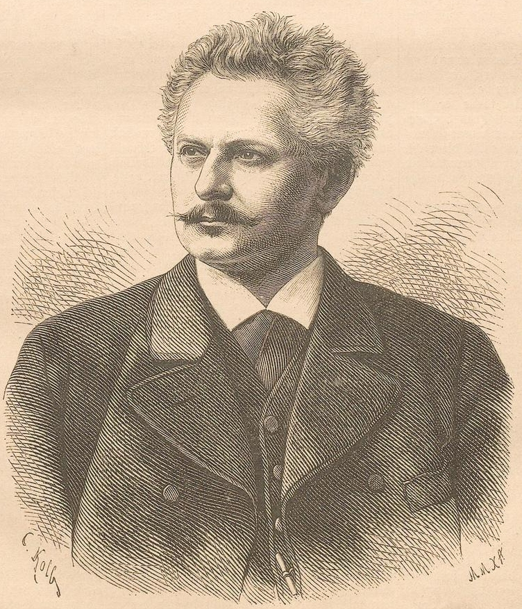 Friedrich Specht. In: Illustriertes Unterhaltungs-Blatt: wöchentliche Beilage zum Darmstädter Tagblatt. Darmstadt, 1892